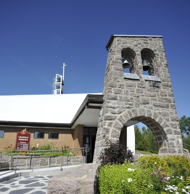 Chapelle Mariale de l'Ermitage Saint-Antoine construite en 1949, c'est la première chapelle d'architecture moderne au Québec.